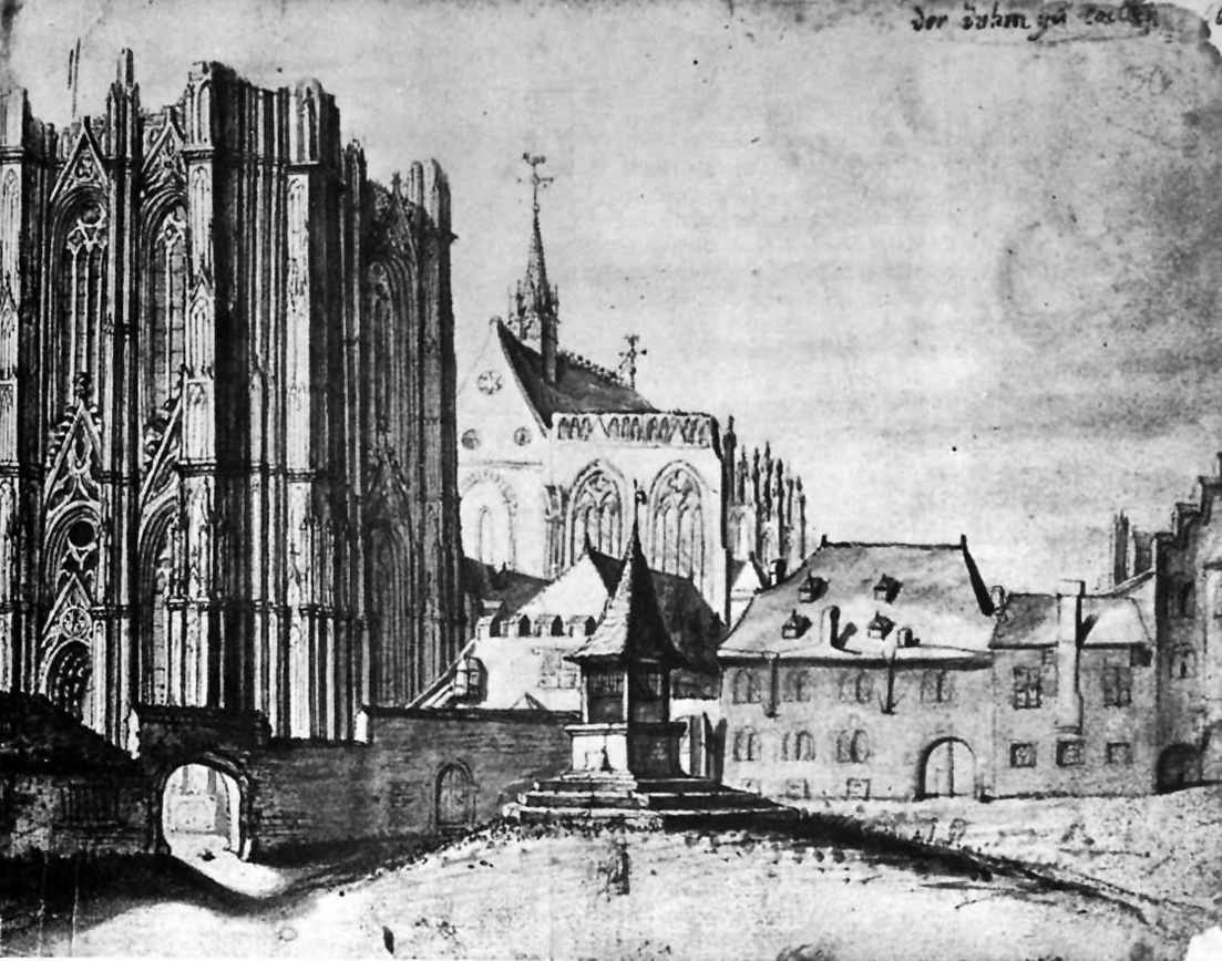 Kölner Dom von Südwesten mit östlicher Bebauung am Domkloster (Aula theologica). Im Vordergrund zur Nordwestseite des Domes eine Mauer mit weitem Torbogen als Durchgang zum Petersportal. Rechts auf dem Platz Domkloster steht ein bereits 1465 erwähntes Pützhaus. Justus Finkenbaum, Köln 17. Jahrhundert. Das Blatt ist benannt als „der duhm zu coellen“